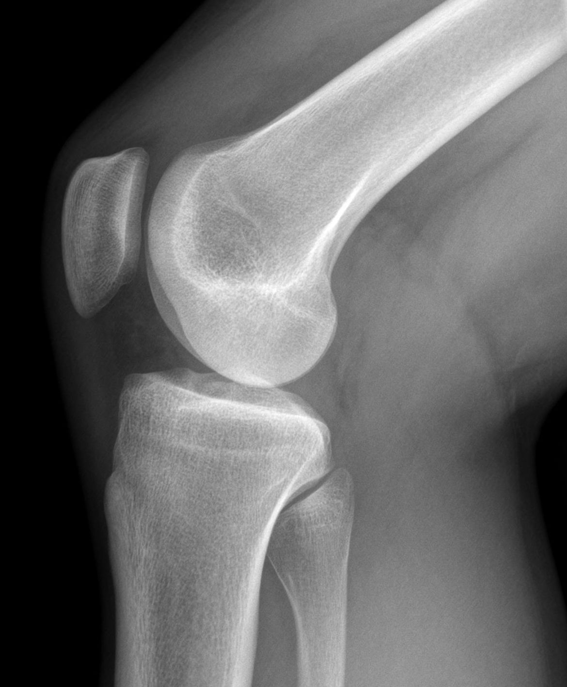 Rechtes Knie eines 20 jährigen, Röntgen von der Seite. Keine Pathologie. Einzig auffällig ist eine betonte Grenzrinne am Kondylus (weiter unten, daher wohl lateral), was theoretisch auf einen Kreuzbandriss hindeuten kann, in diesem Fall aber klinisch nicht passte.